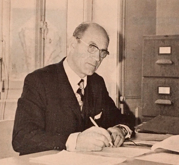 Francisque Perrut, maire-adjoint de Villefranche sur Saône, hôtel de ville 1977.